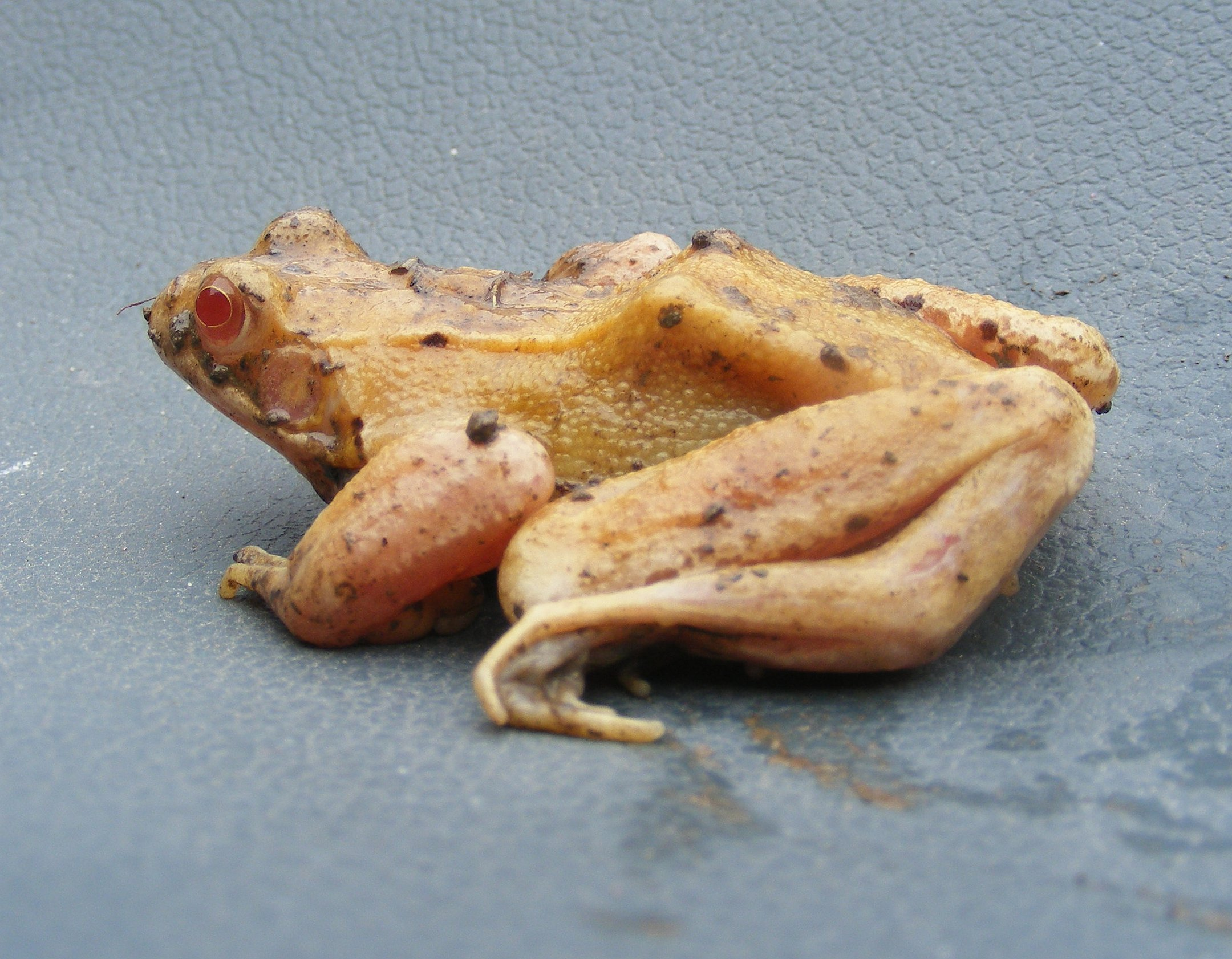 Grasfrosch, Amelanotisch - der gelbe Farbstoff ist offensichtlich vorhanden, gefunden bei einer "Krötenaktion" im Grenzgebiet Nationalpark (Erkensruhr)